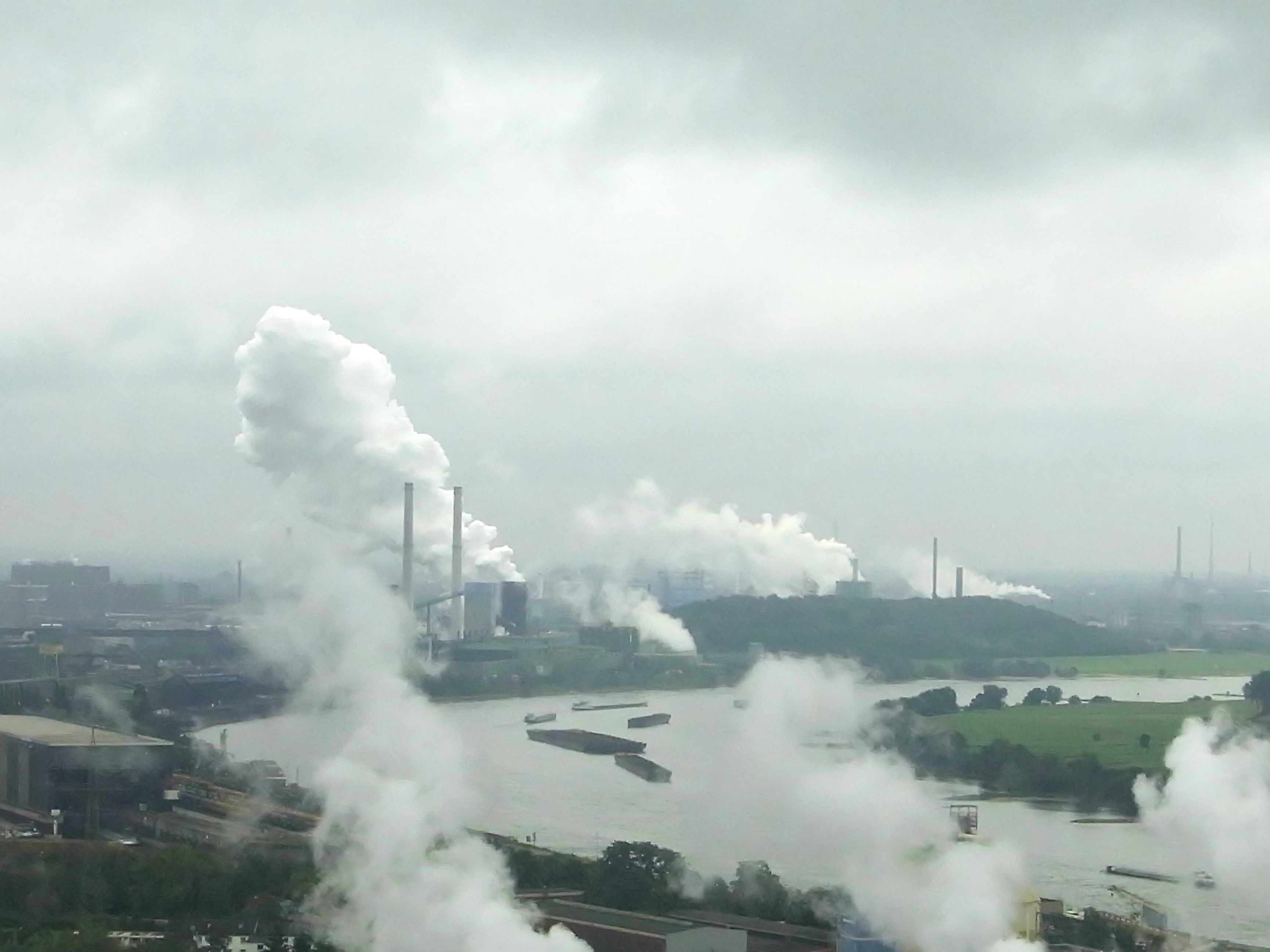 Blick vom Block 9 des Kraftwerks Duisburg-Walsum: Rhein, Kokerei Schwelgern und Alsumer Berg